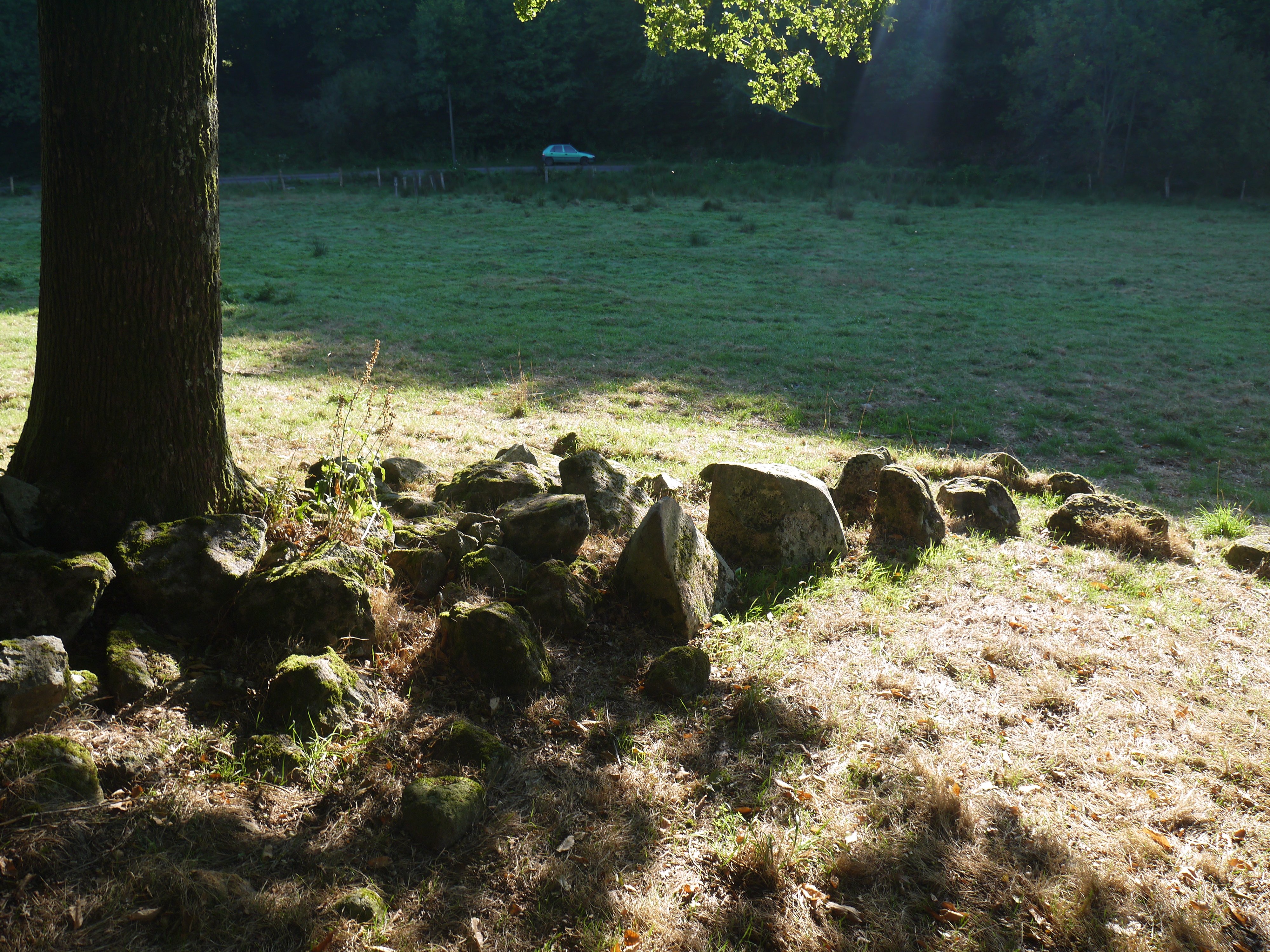 Vue globale à partir du côté ouest